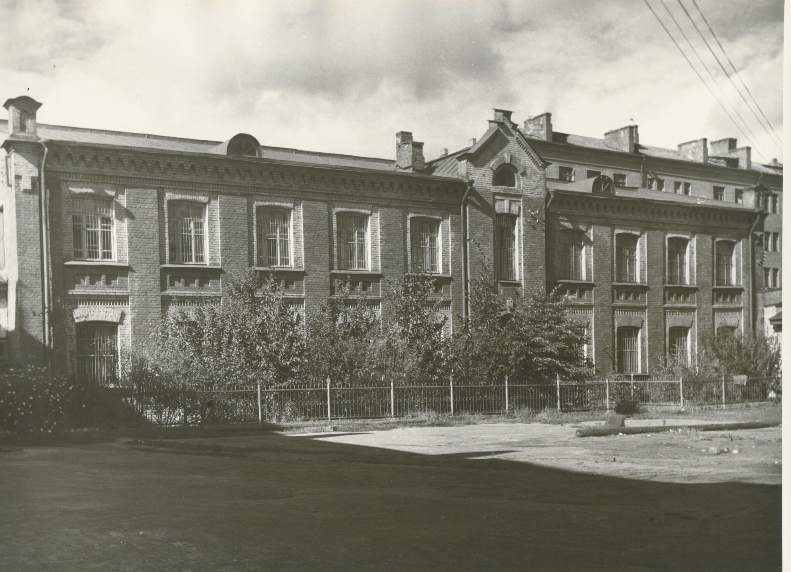 партархив